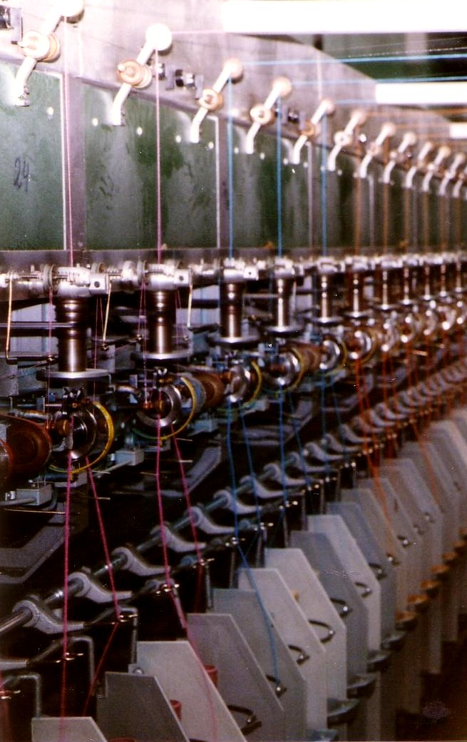 Chenille-Zwirnmaschine (Baujahr ca. 1975)